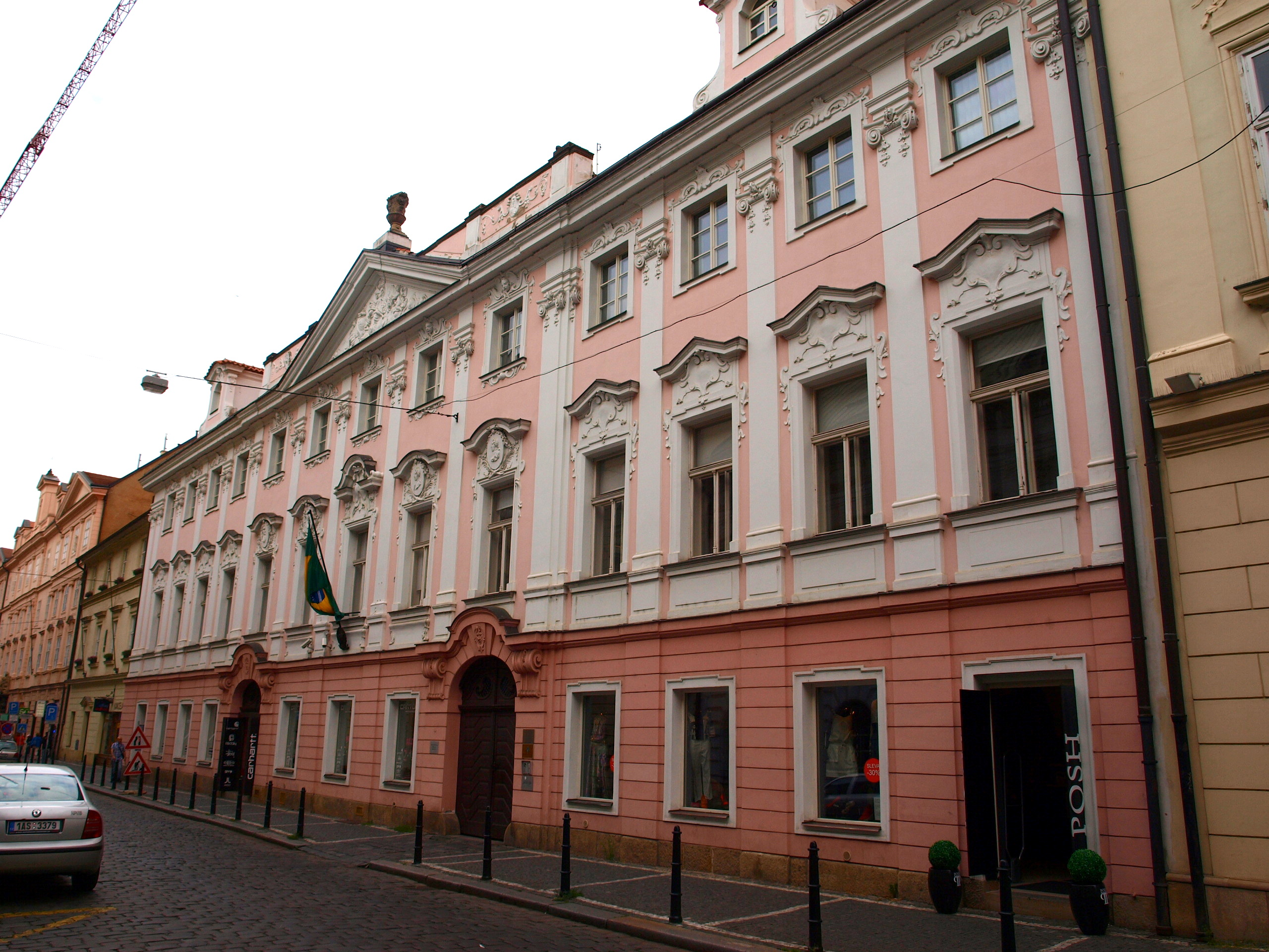 Neubergovský palác - Panská